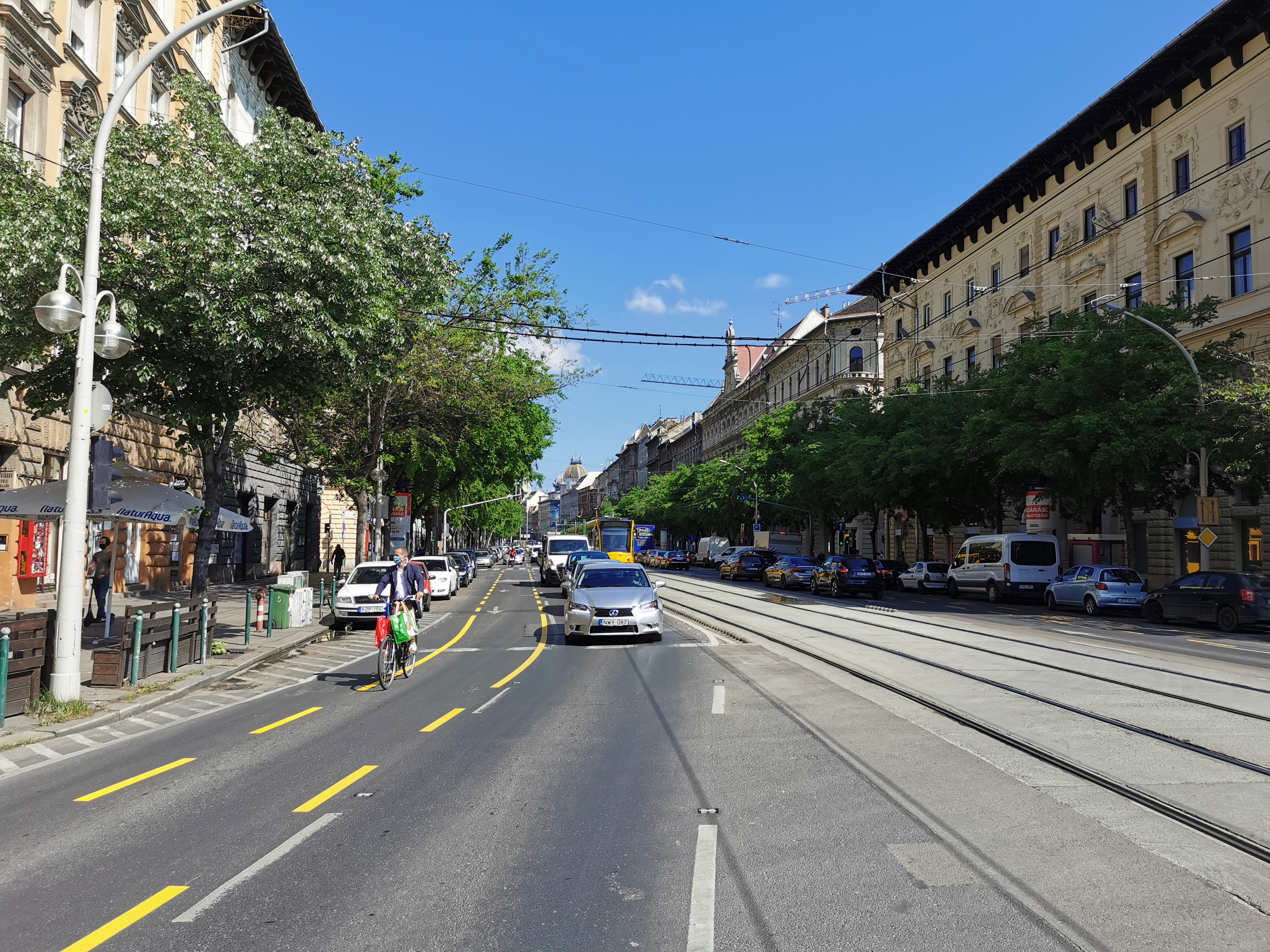 Kerékpárút a budapesti József körúton.